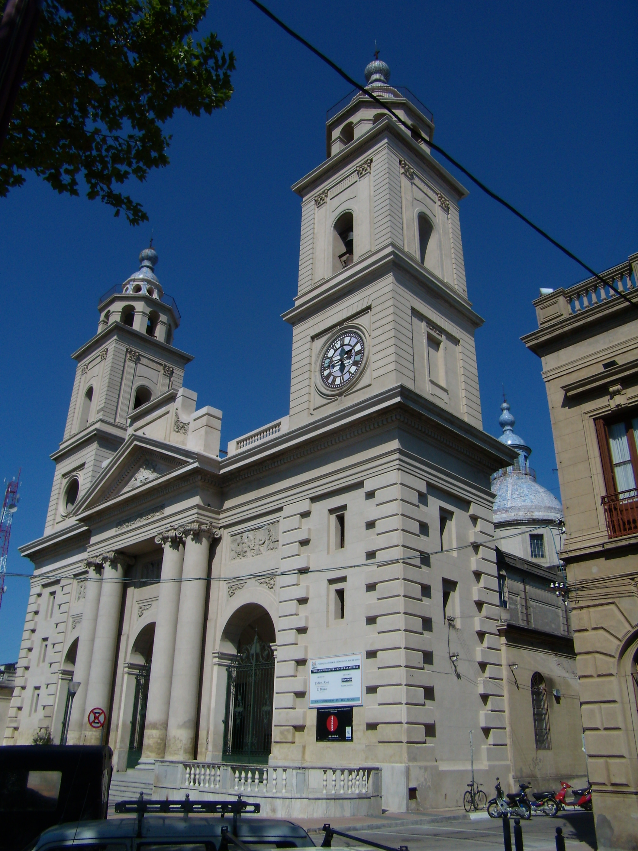 Catedral de San José de Mayo, Uruguay